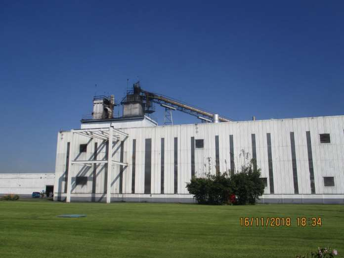 Εργοστάσιο TRADOC